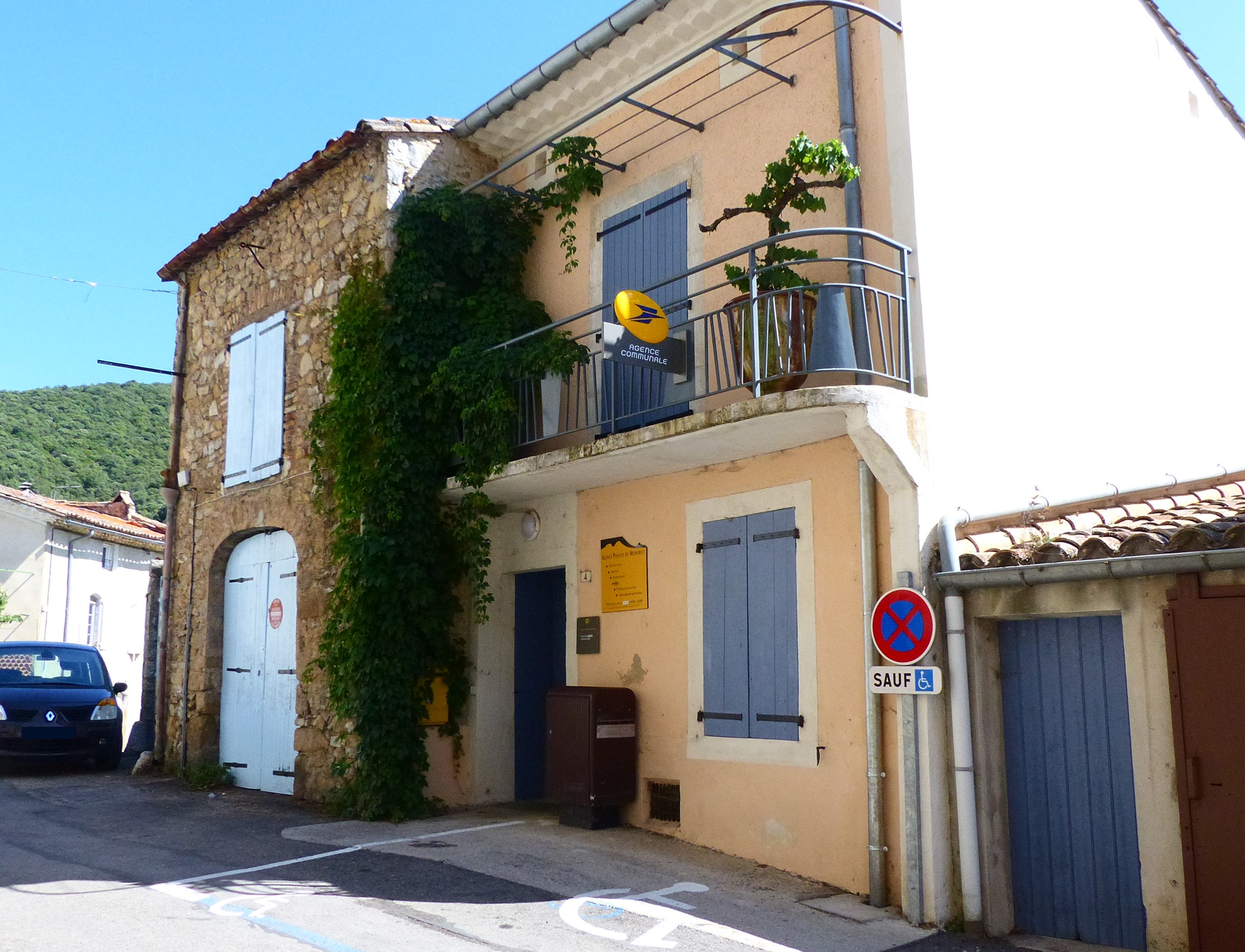 Bureau de poste de Monoblet (Gard)